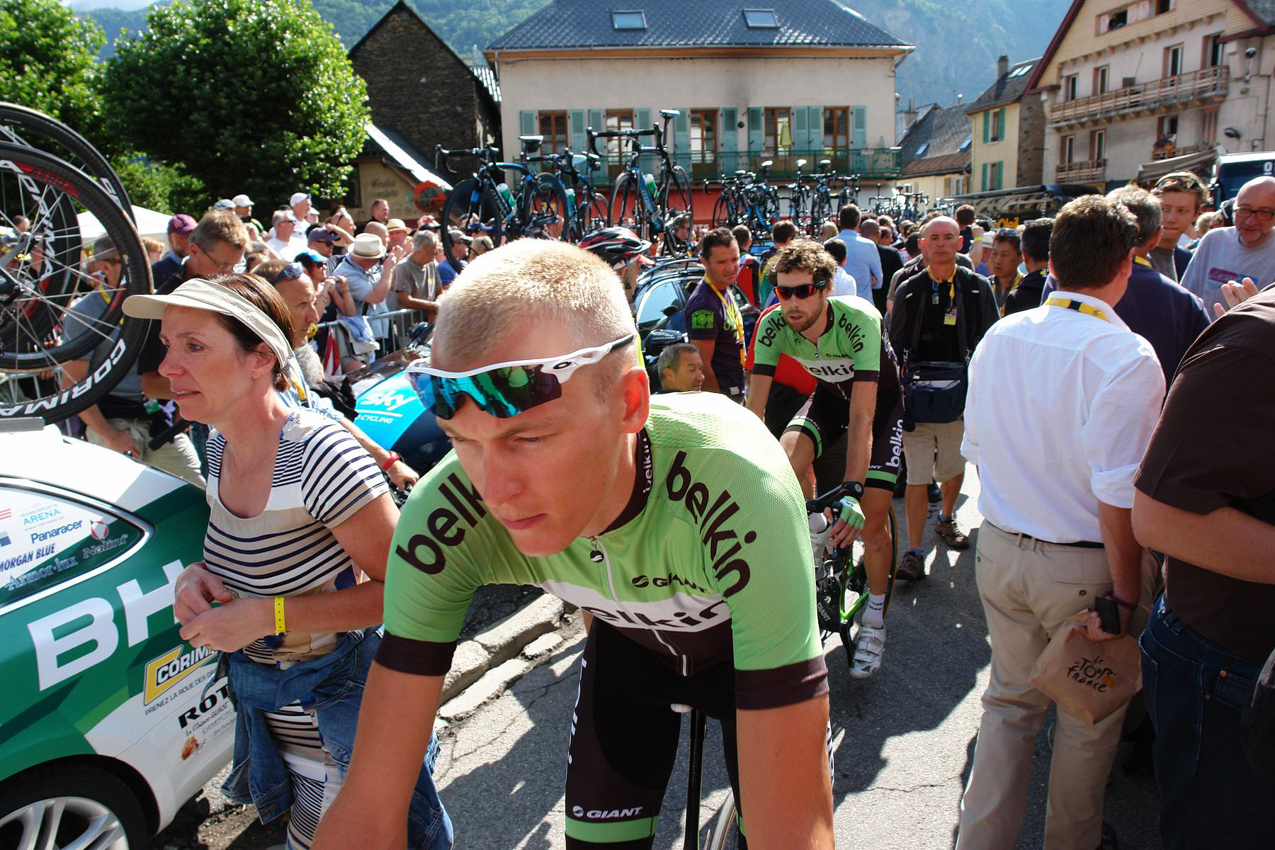 Robert Gesink am Start der 19. Etappe der Tour de France 2013 in Le Bourg-d’Oisans, 19. Juli 2013.